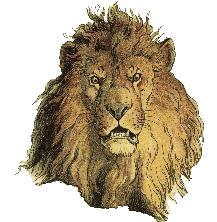 "König Nobel" von Fedor Alexis Flinzer († 1911) Kategorie:Bild eines Tieres